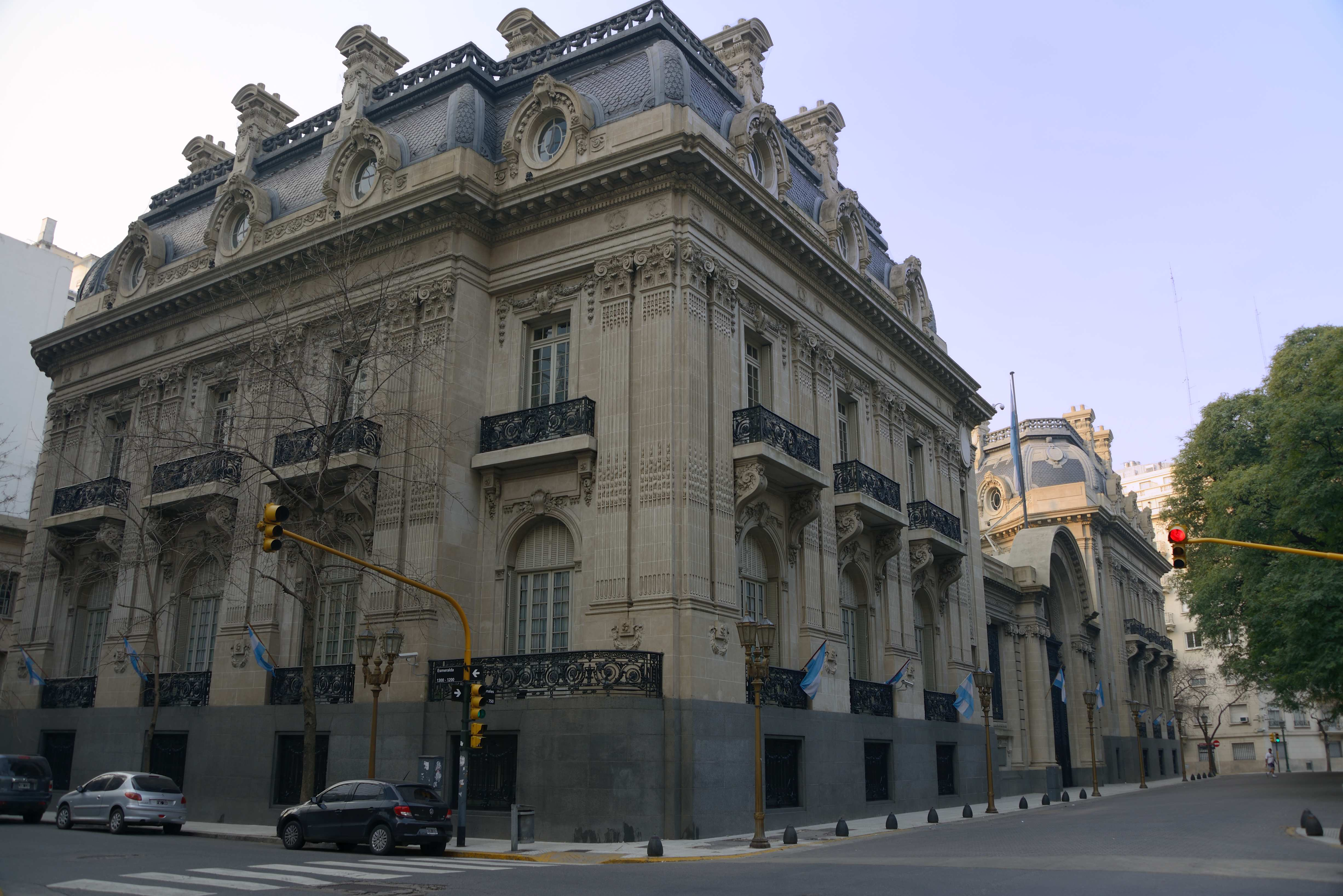 Palacio San Martin